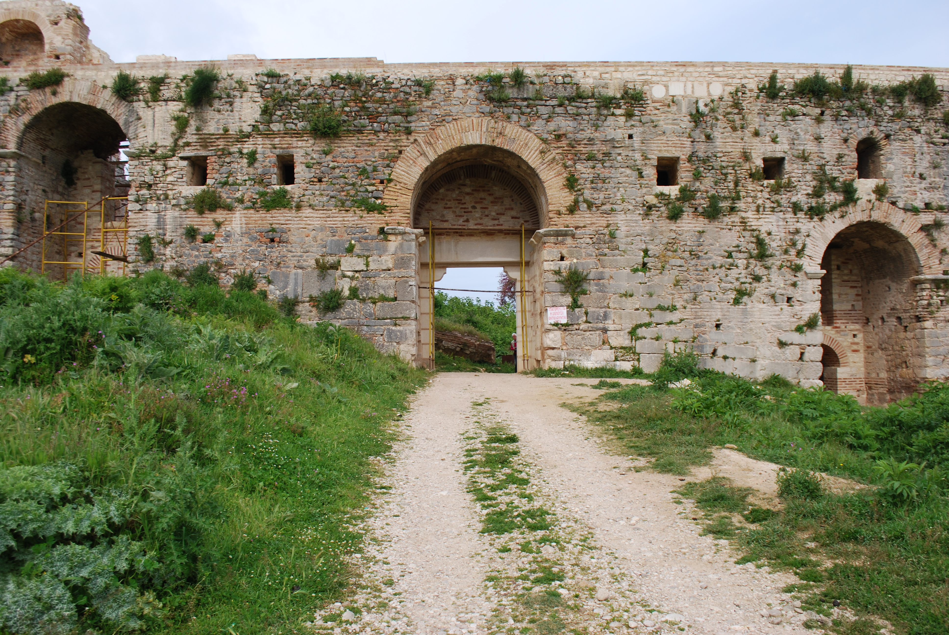 Vue de Nicopolis en Epire.